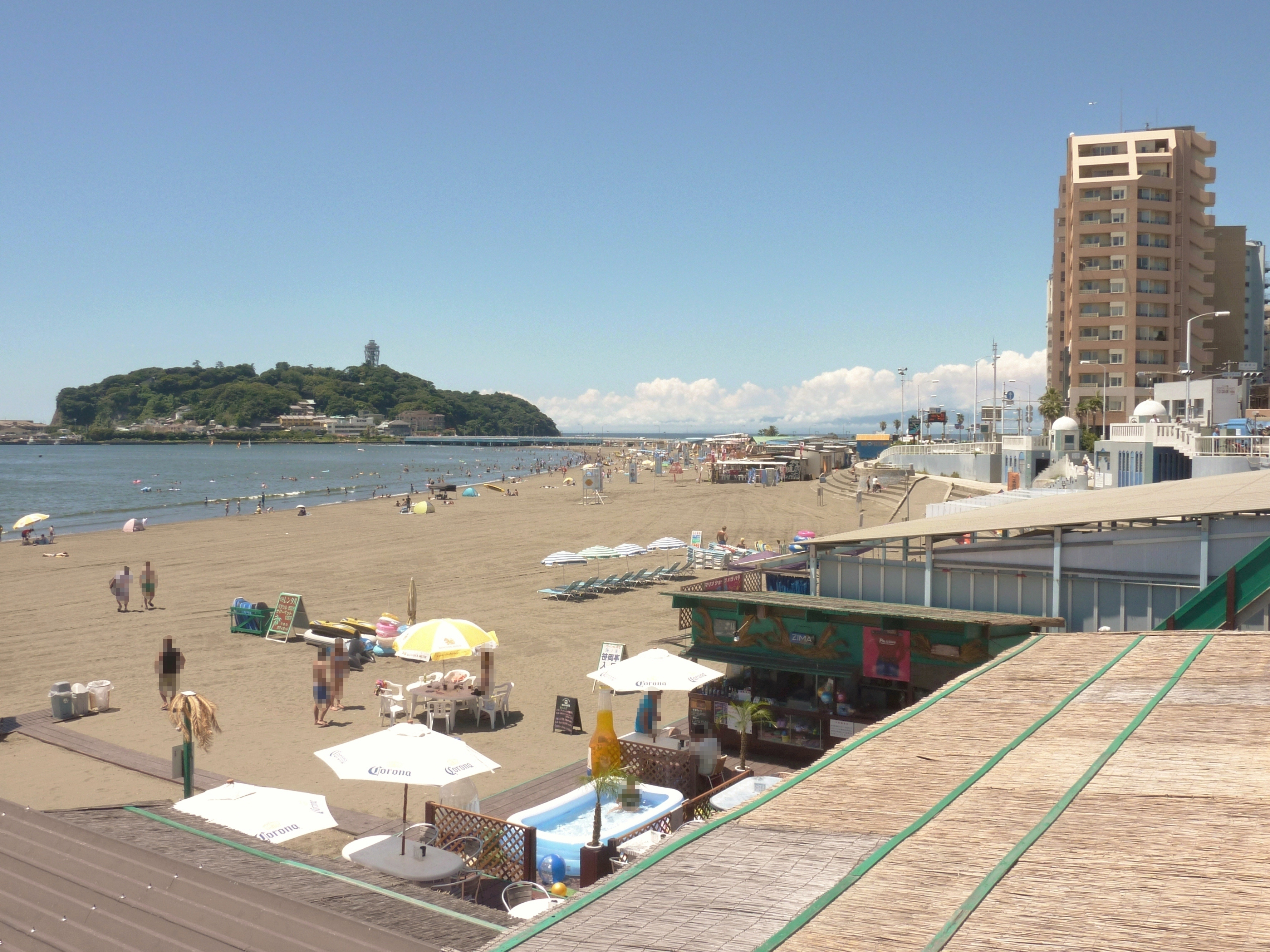 江ノ島東浜海水浴場から見た江の島（神奈川県藤沢市）